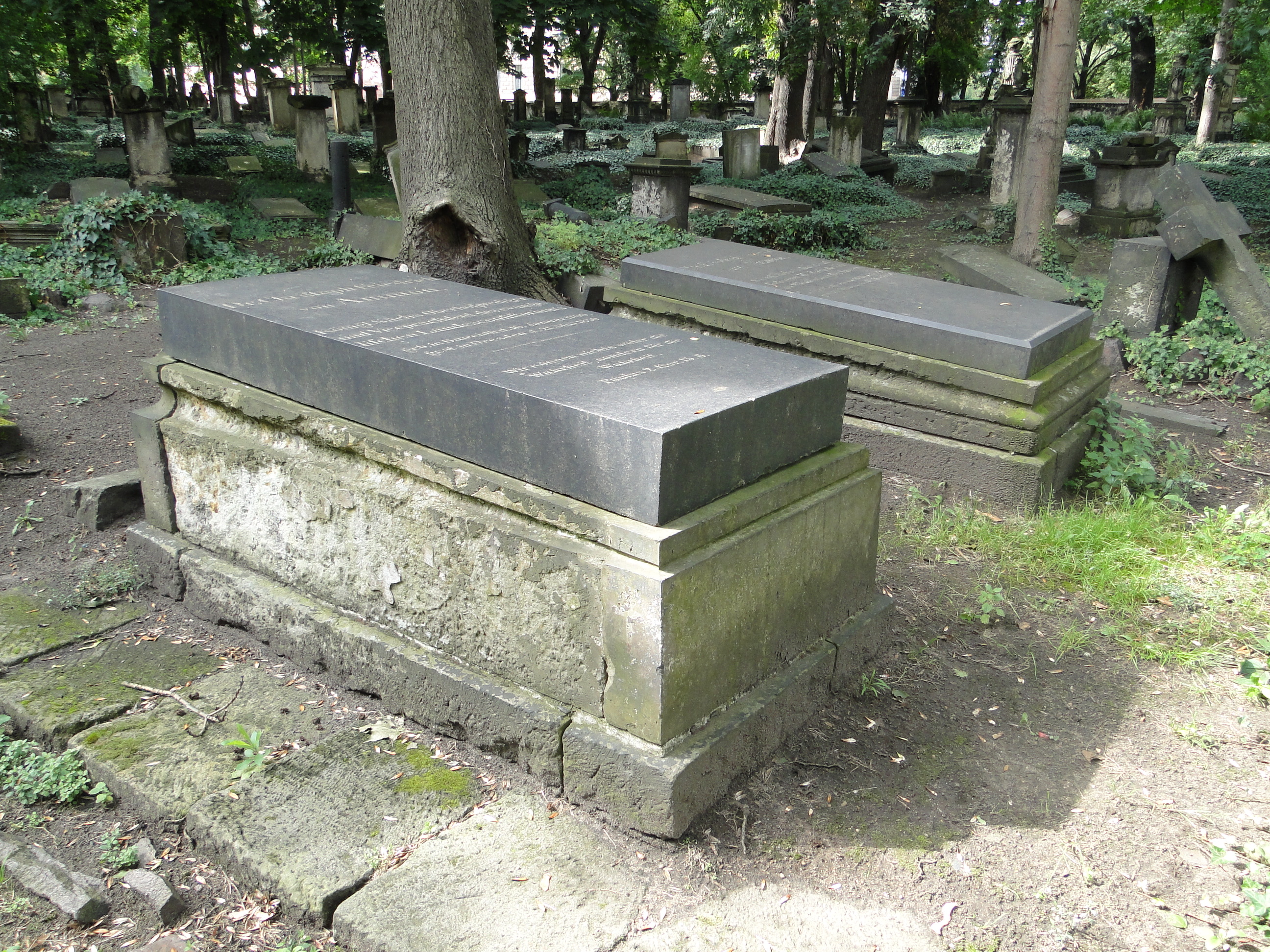 Grab von Christoph (vorn) und August von Ammon (hinten) auf dem Eliasfriedhof in Dresden